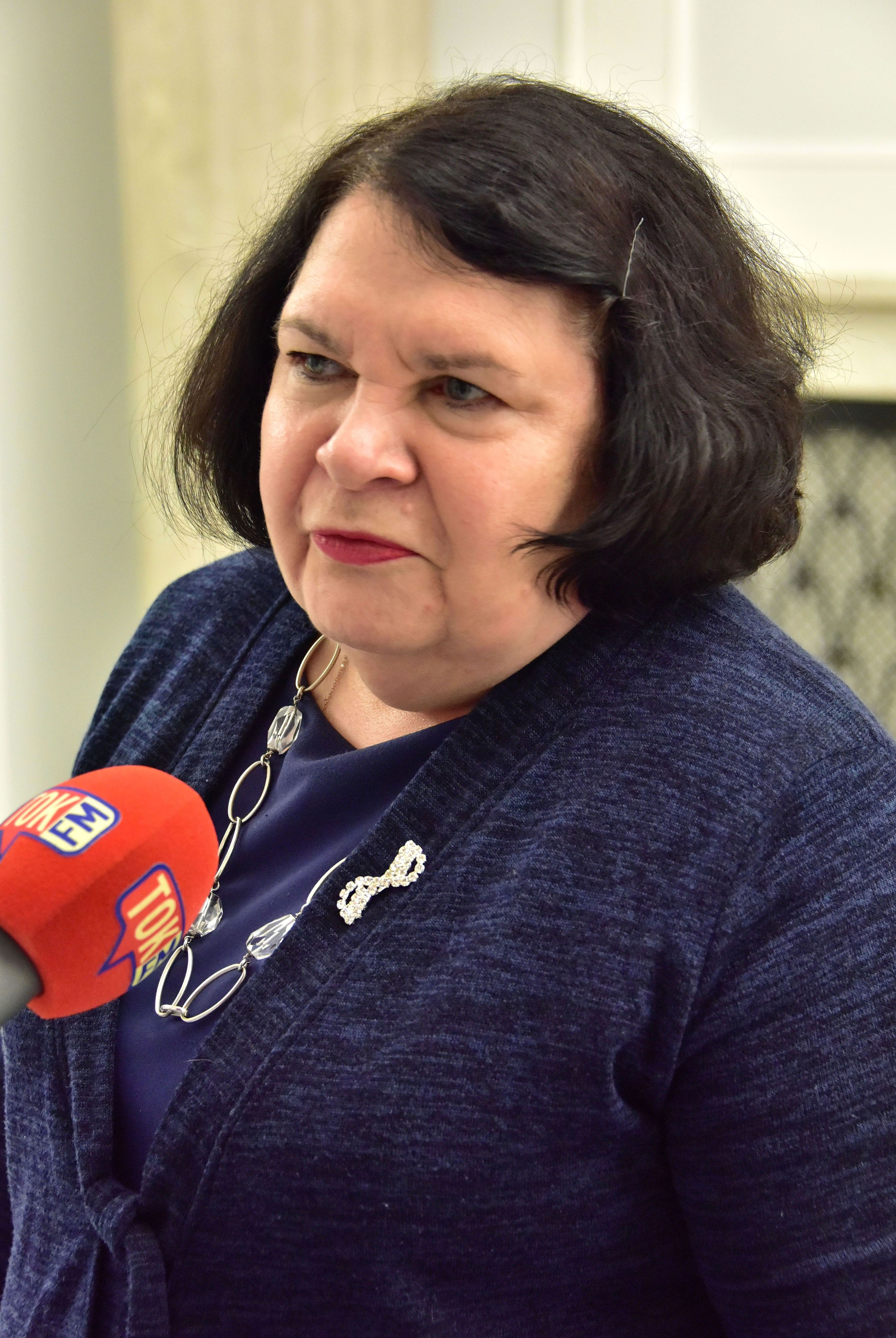 Posłanka Anna Sobecka w Sejmie